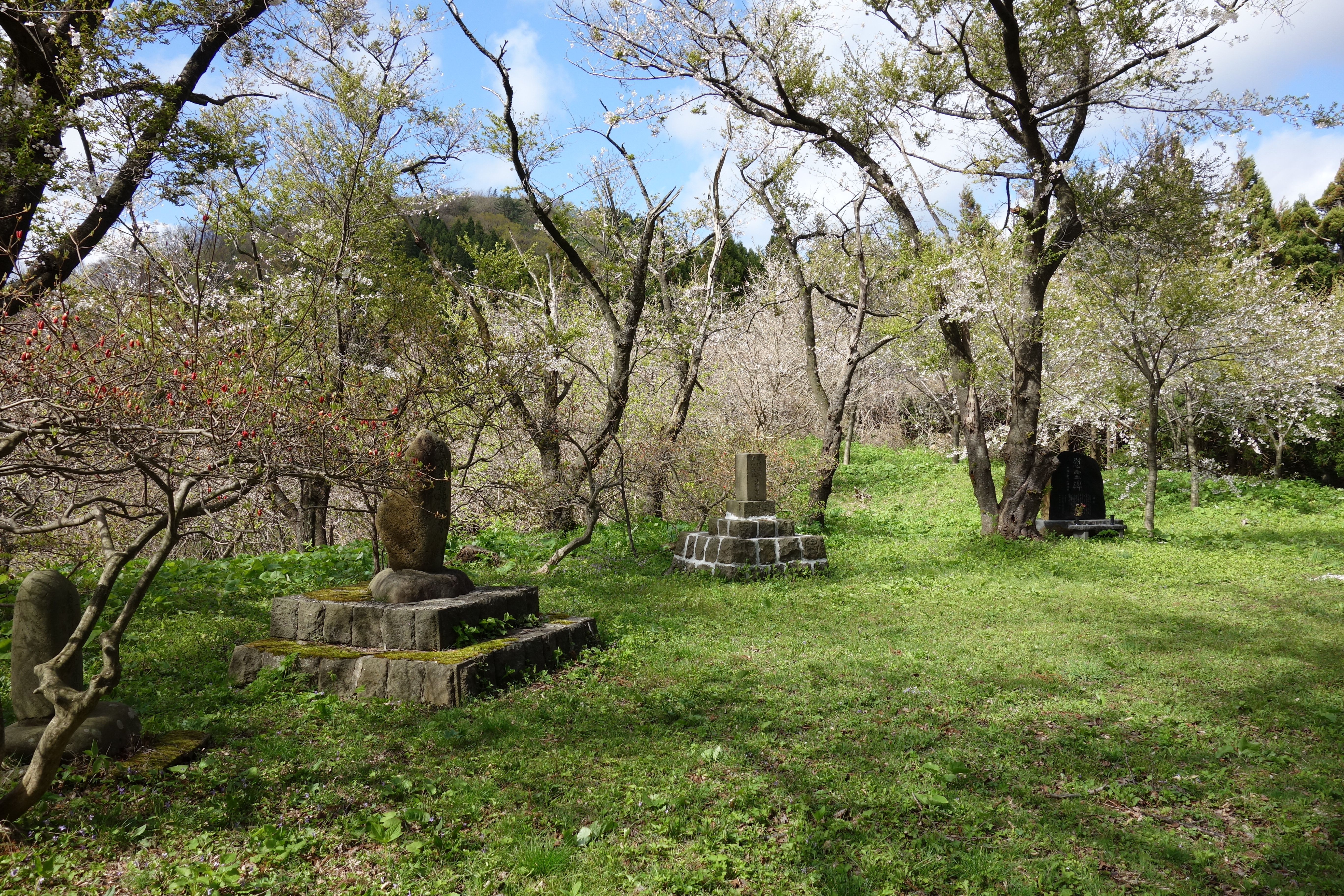 本館城跡 秋田県八峰町八森本館